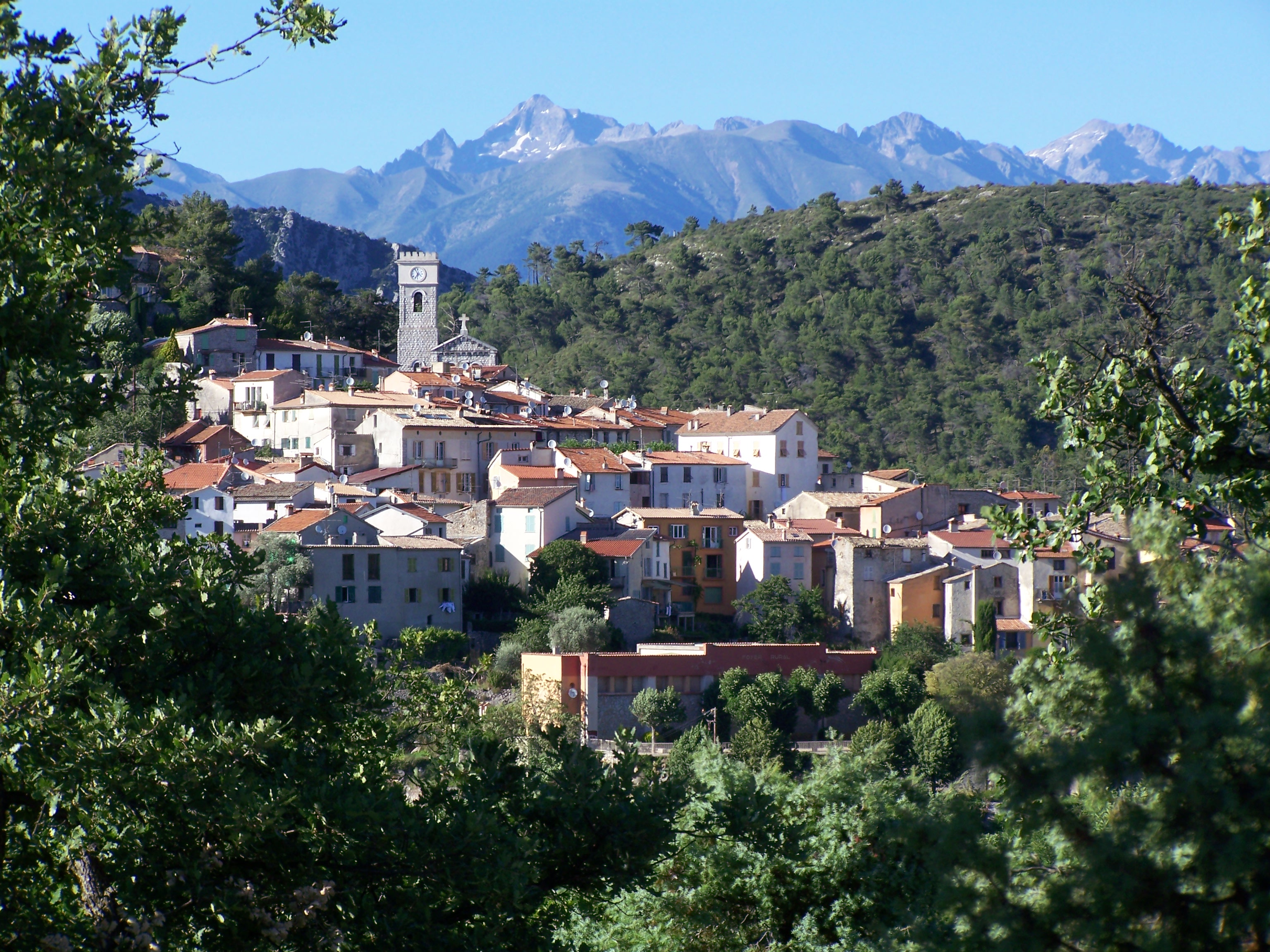 Village de Levens (alt:600m) dans le département des Alpes-Maritimes (France), vu de l'ouest avec en arrière-plan le mont Gélas (alt:3143m), point culminant du département sur la frontière franco-italienne.